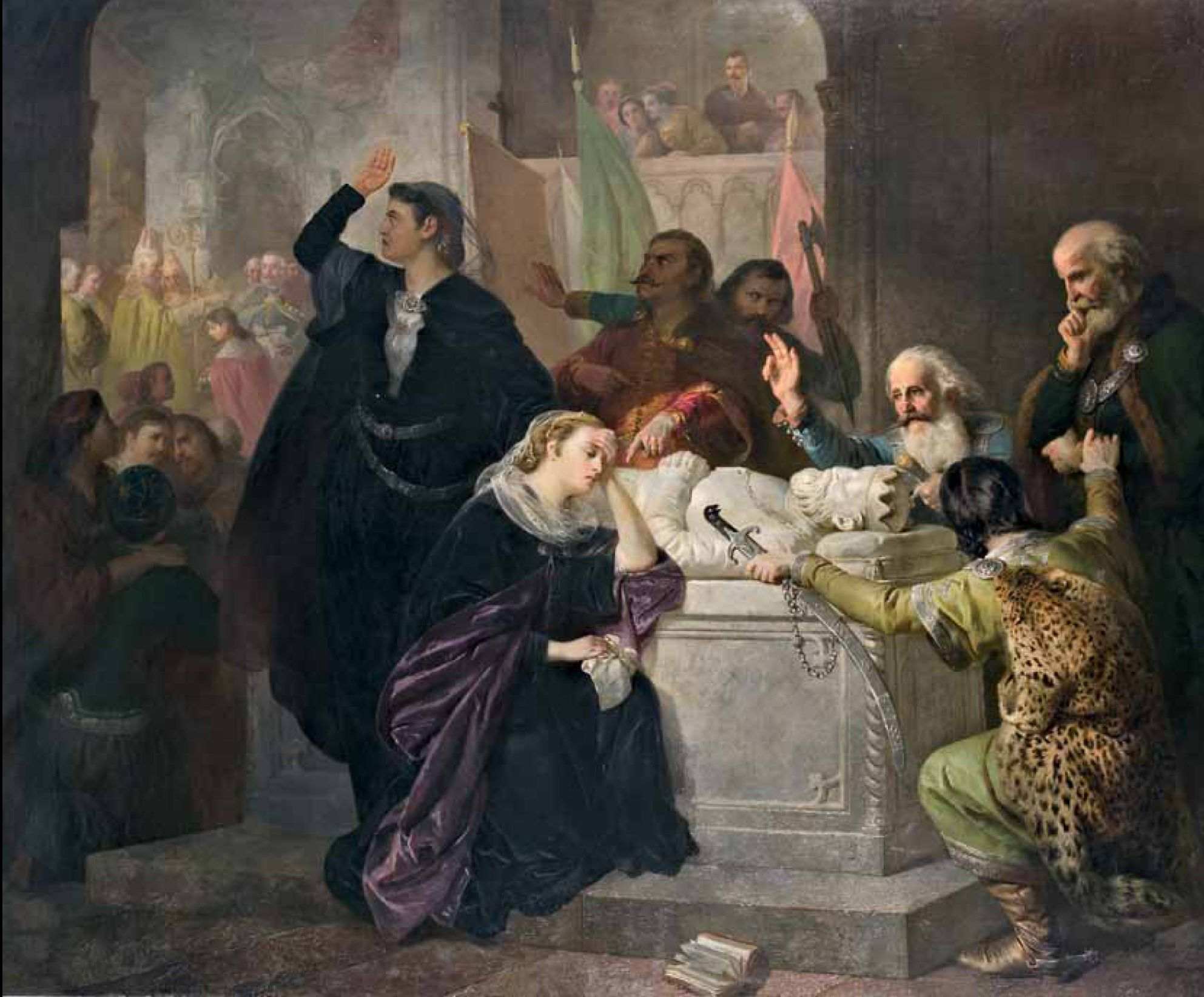 31 December 1385